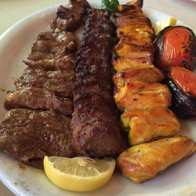 Barg, Koobideh, and Joojeh #kabobs #persian